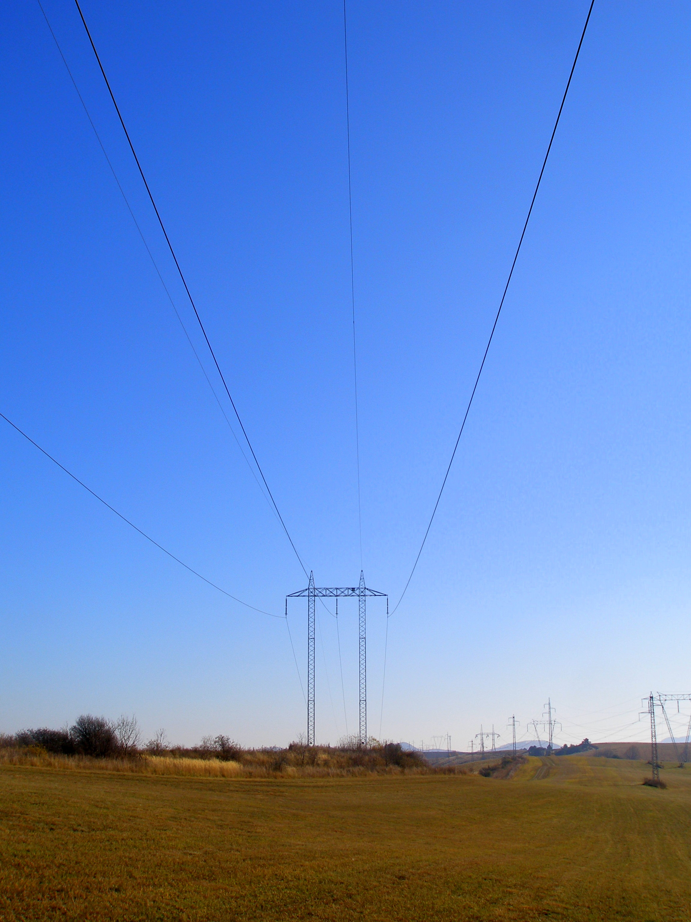 Šarišská vrchovina v katastri obce Klenov. Okres Prešov. Časť prenosovej sústavy elektrickej energie.